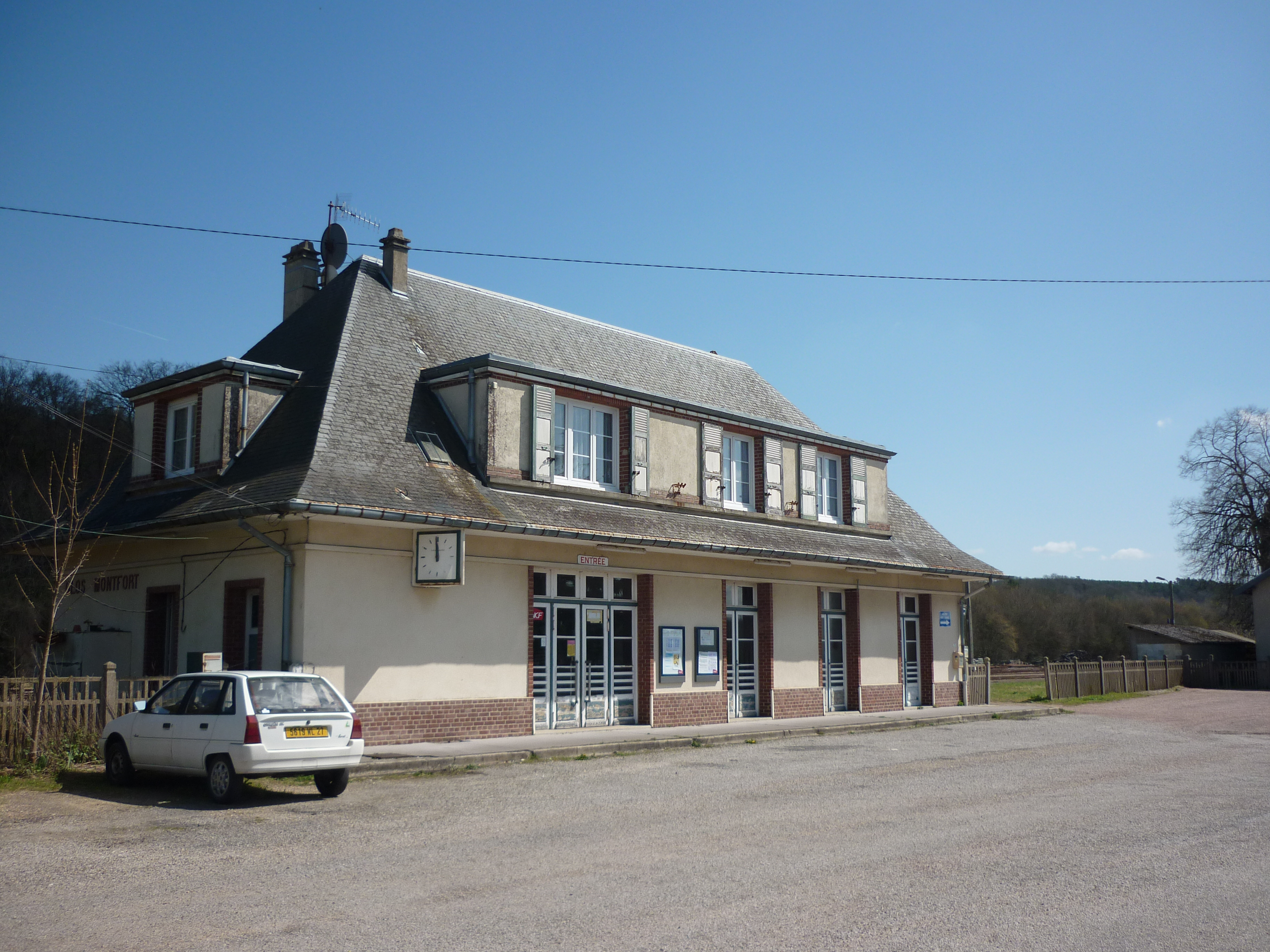 Bâtiment voyageurs de la gare de Glos-Monfort